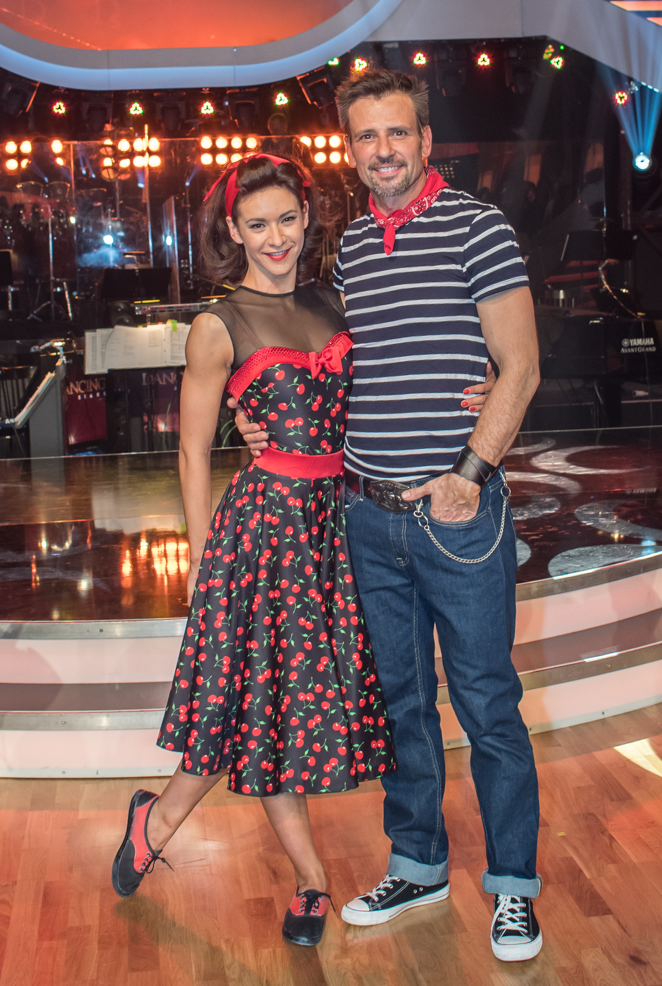 ORF Dancing Stars am 28. April 2017 im ORF-Zentrum Wien. Bild zeigt Alexandra Scheriau und Volker Piesczek.